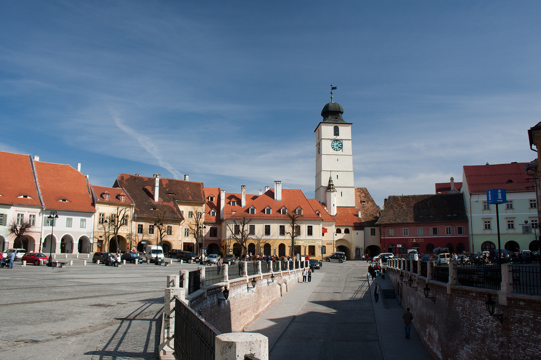 Incinta II: Turnul Sfatului, Turnul Scării Aurarilor, curtine (fragmente) 02